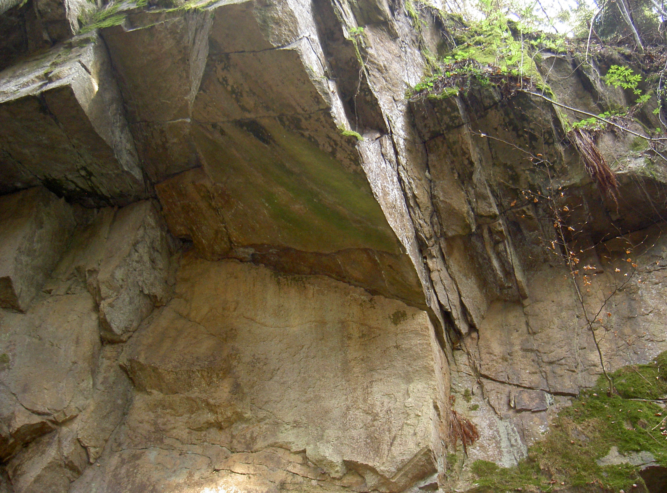 Ehemaliger Steinbruch SW von Theisseil